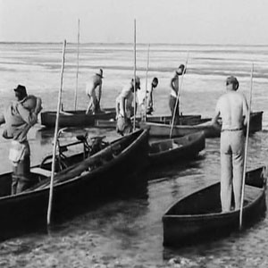 scena del film antimiracolo